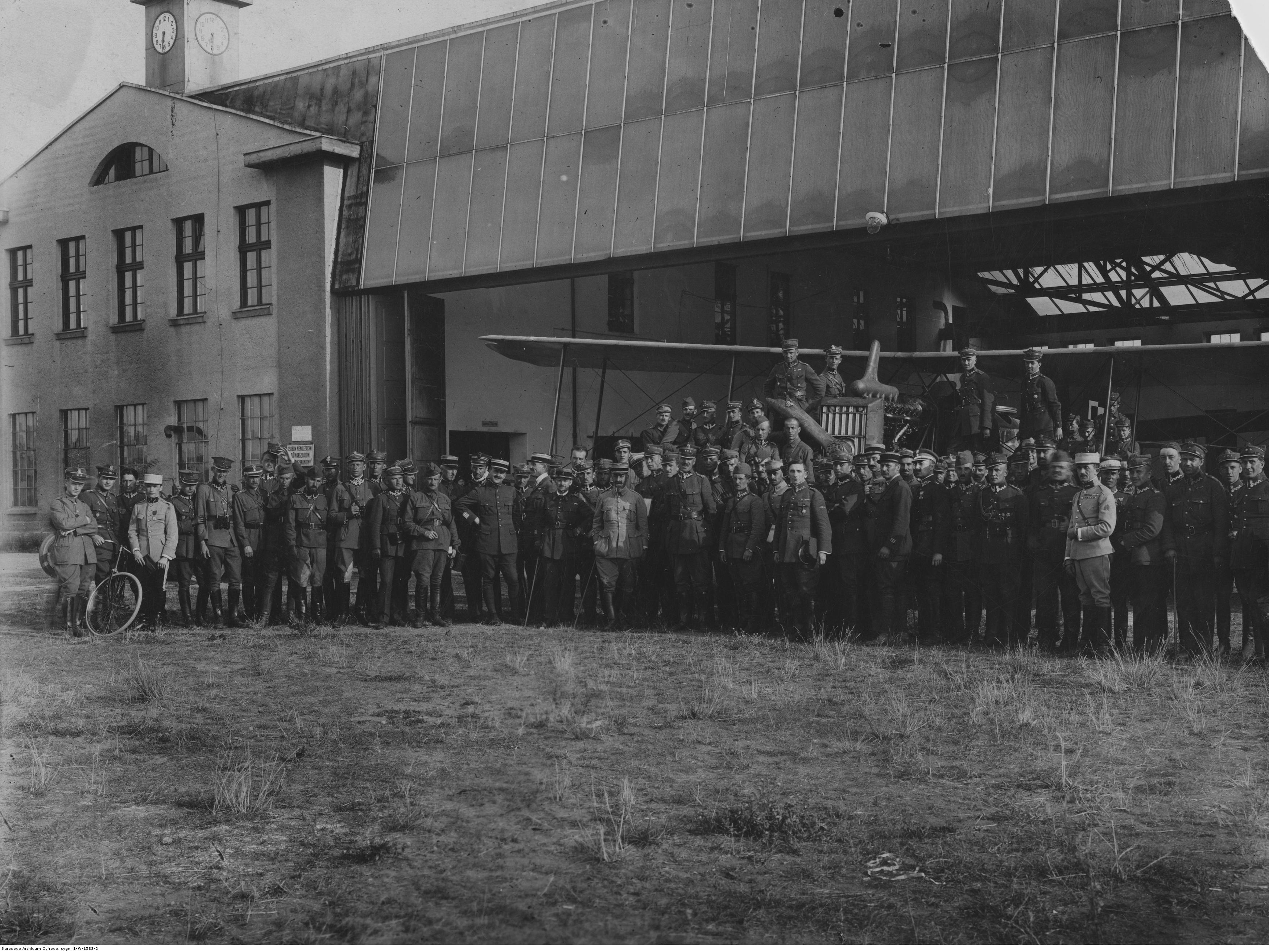 Wizyta zagranicznych wojskowych w 4 pułku lotniczym w Toruniu - fotografia grupowa na tle samolotu przed hangarem; lipiec 1921 r.